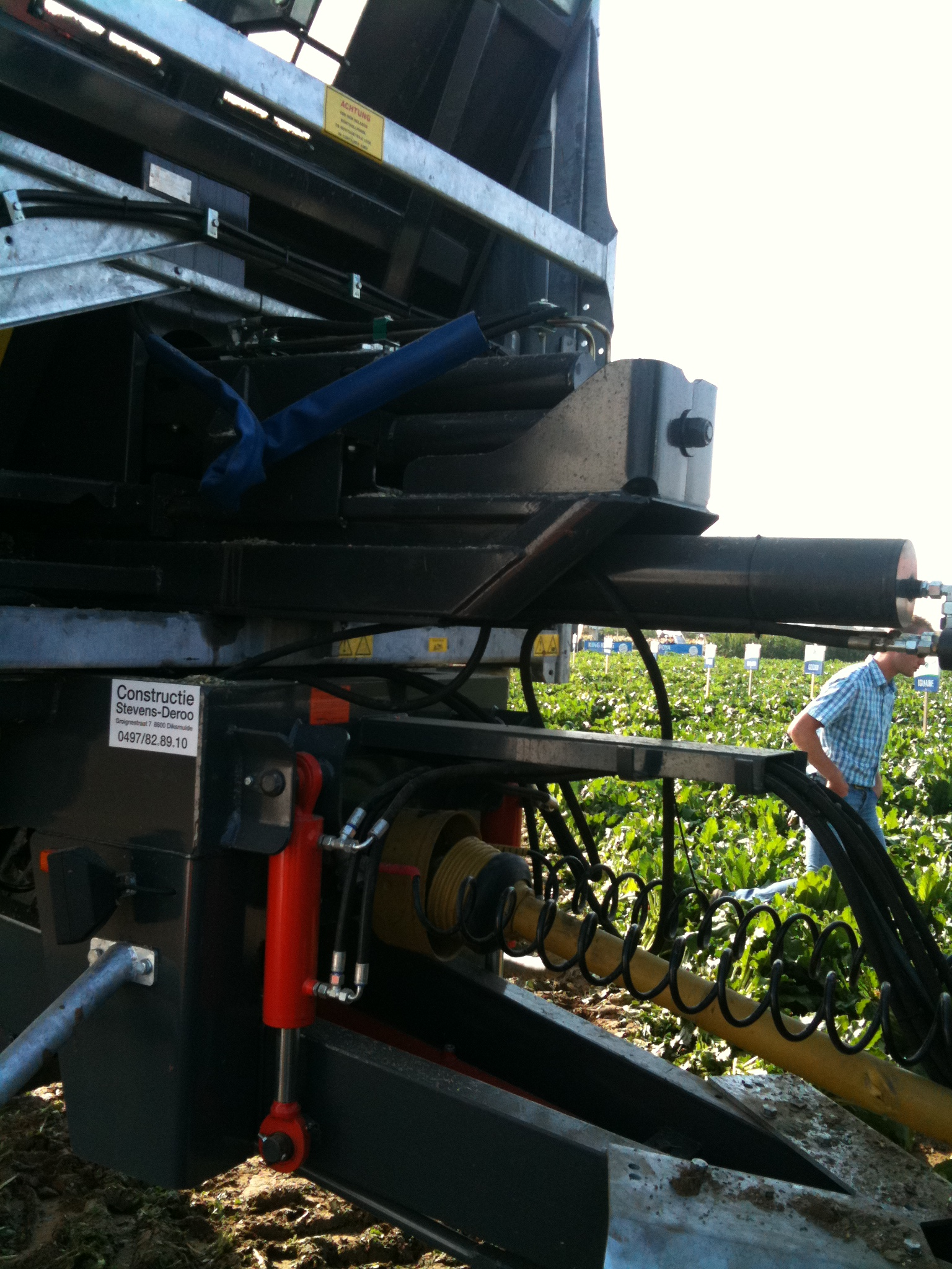 Abschiebewagen mit einigen Zylindern zum Abschieben